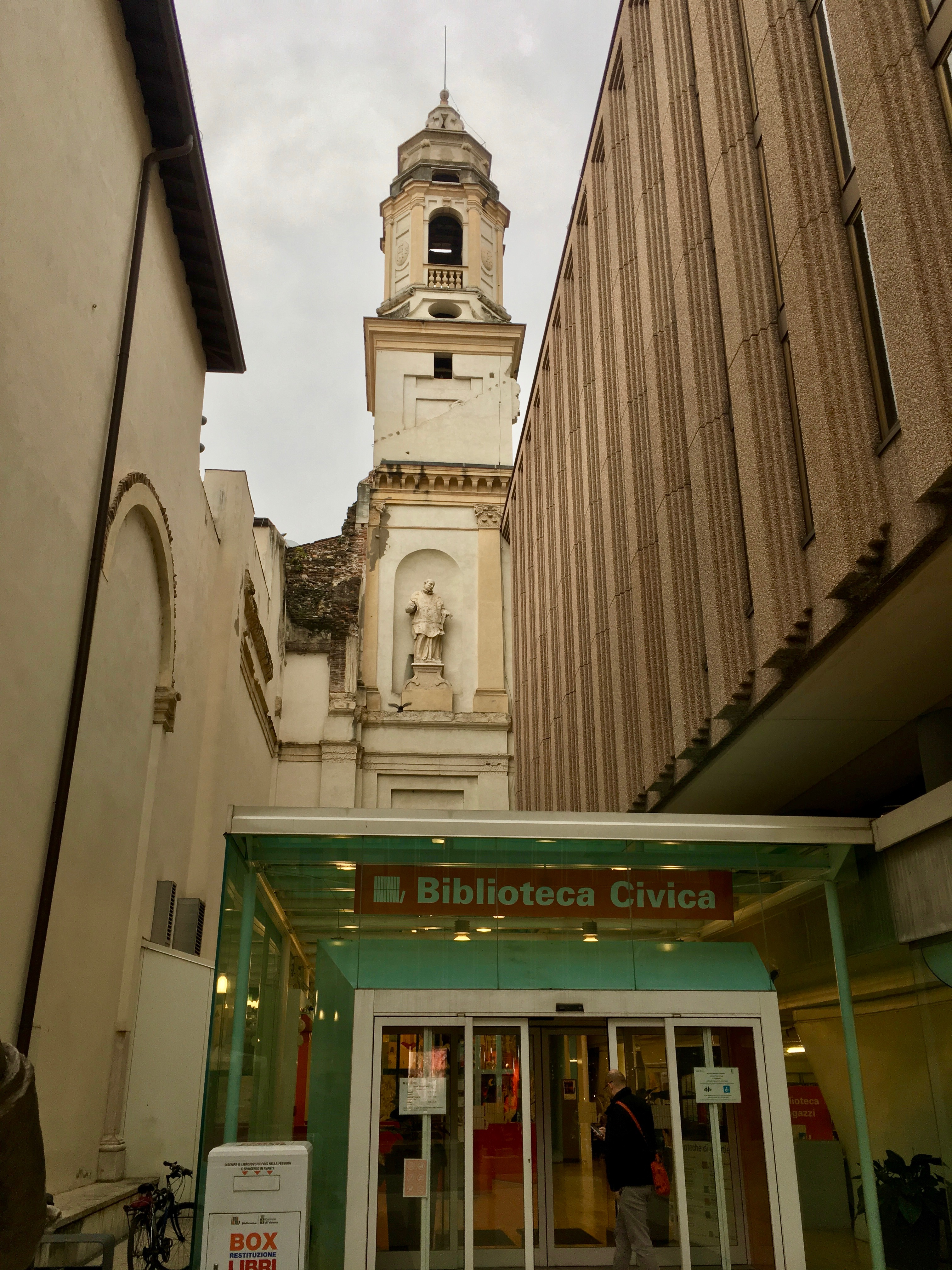 Mostra Wiki Loves Monuments - edizione regionale del Veneto 2018. Verona, Protomoteca della Biblioteca Civica, dal 7 al 14 dicembre 2018.